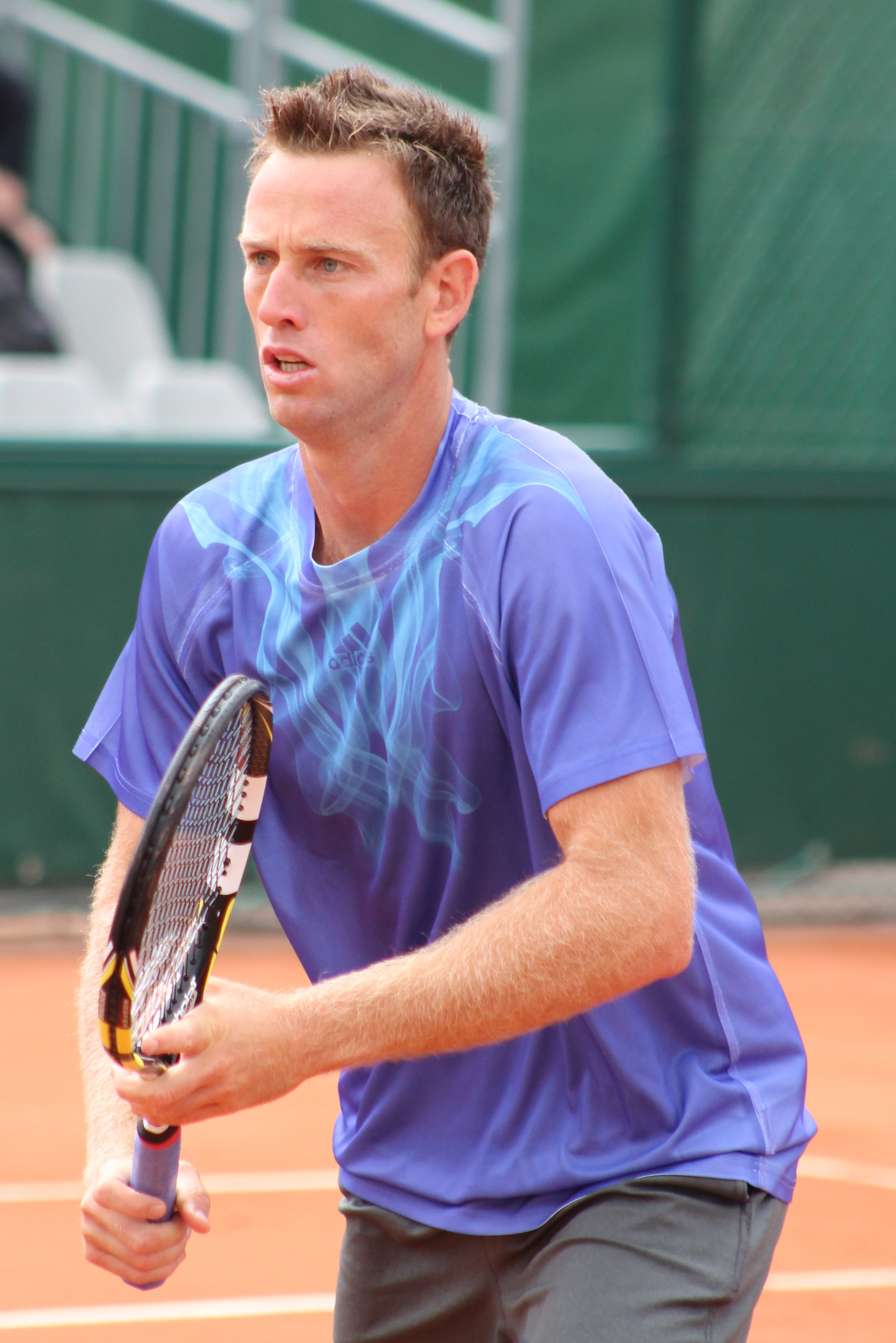 Venus RG15 (1)